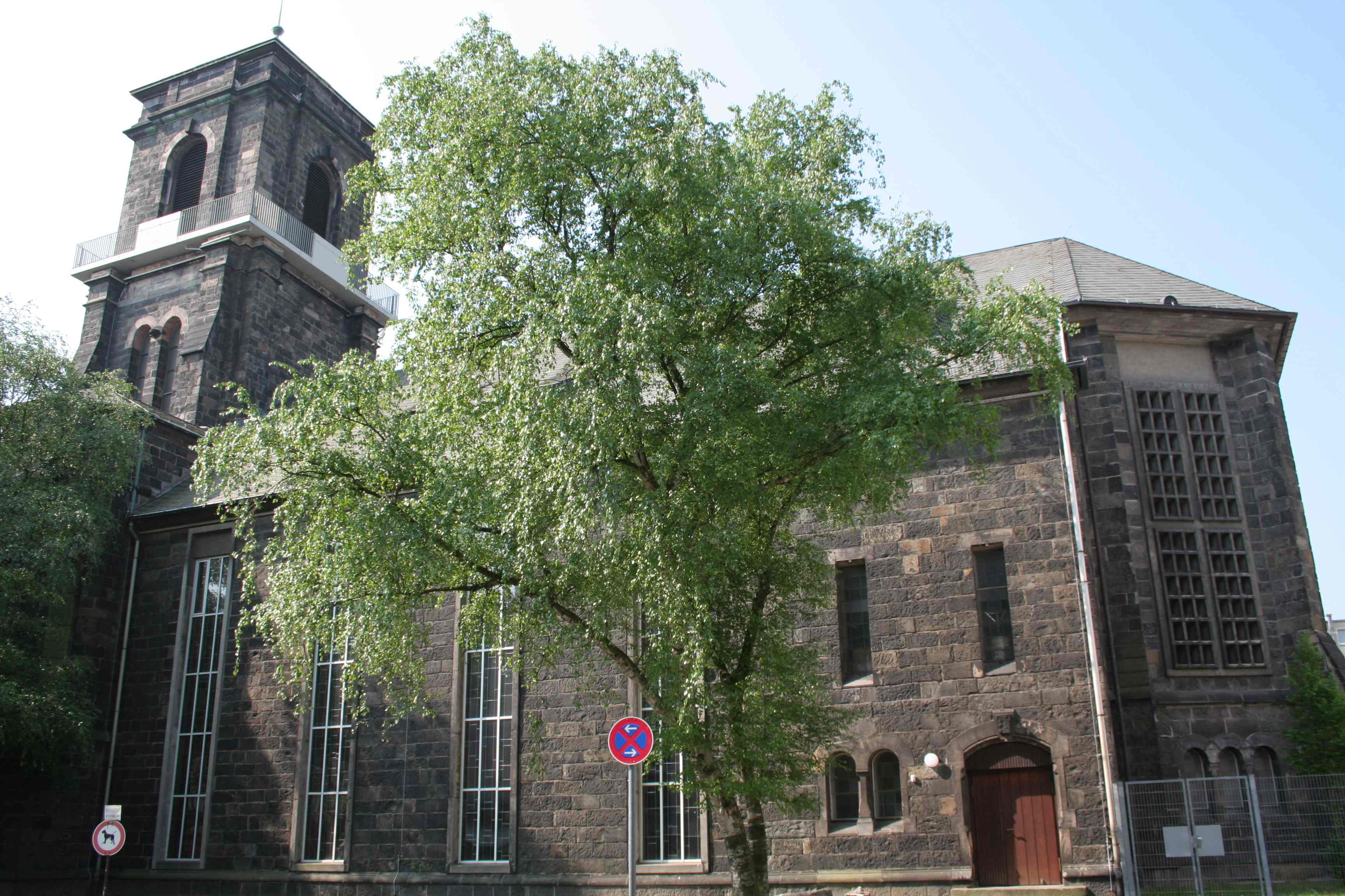 Gemarke Church Wuppertal, Germany